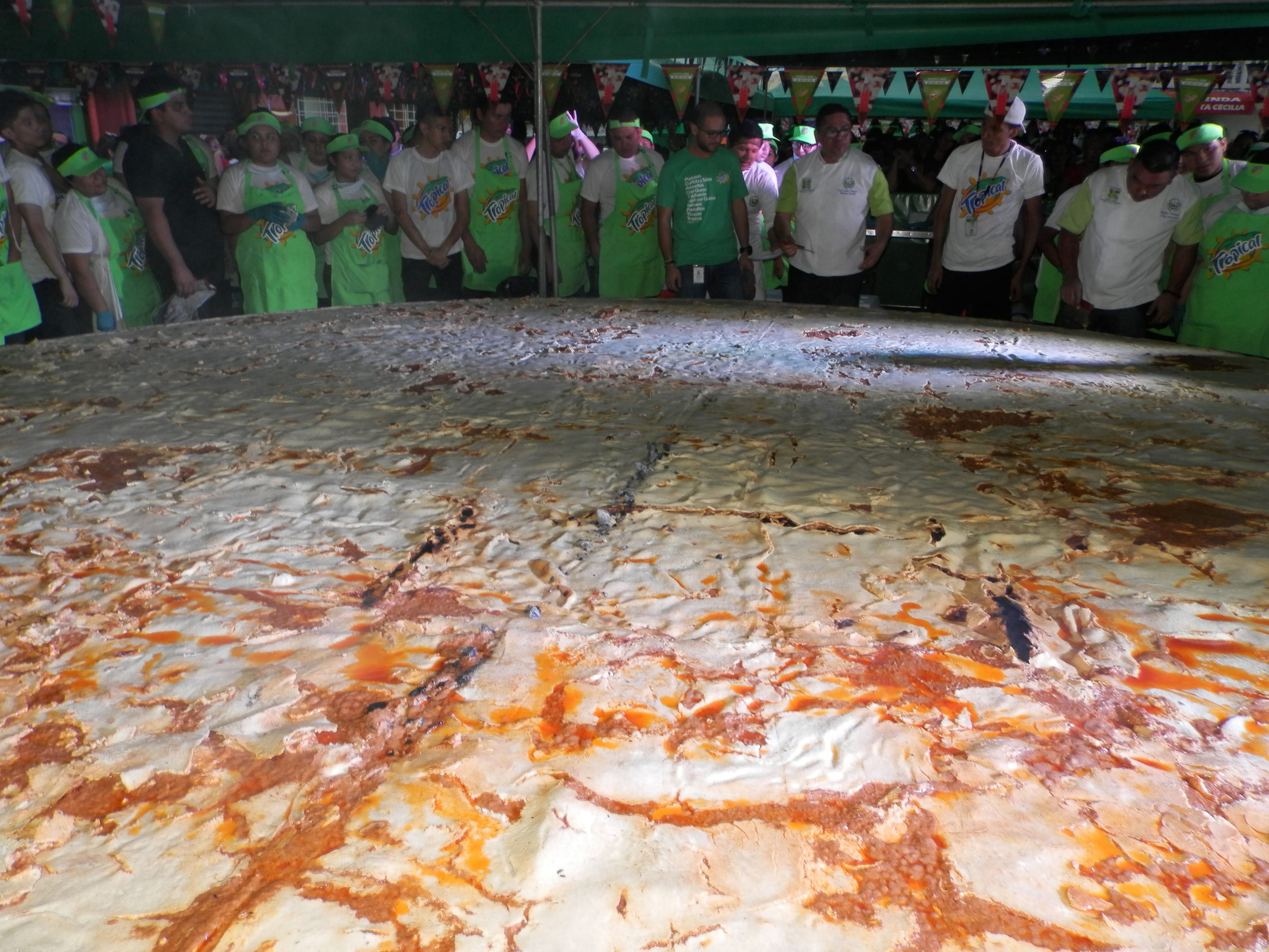 La pupusa mas grande 2016